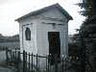 Przeciszów - Kapliczka MB Częstochowskiej